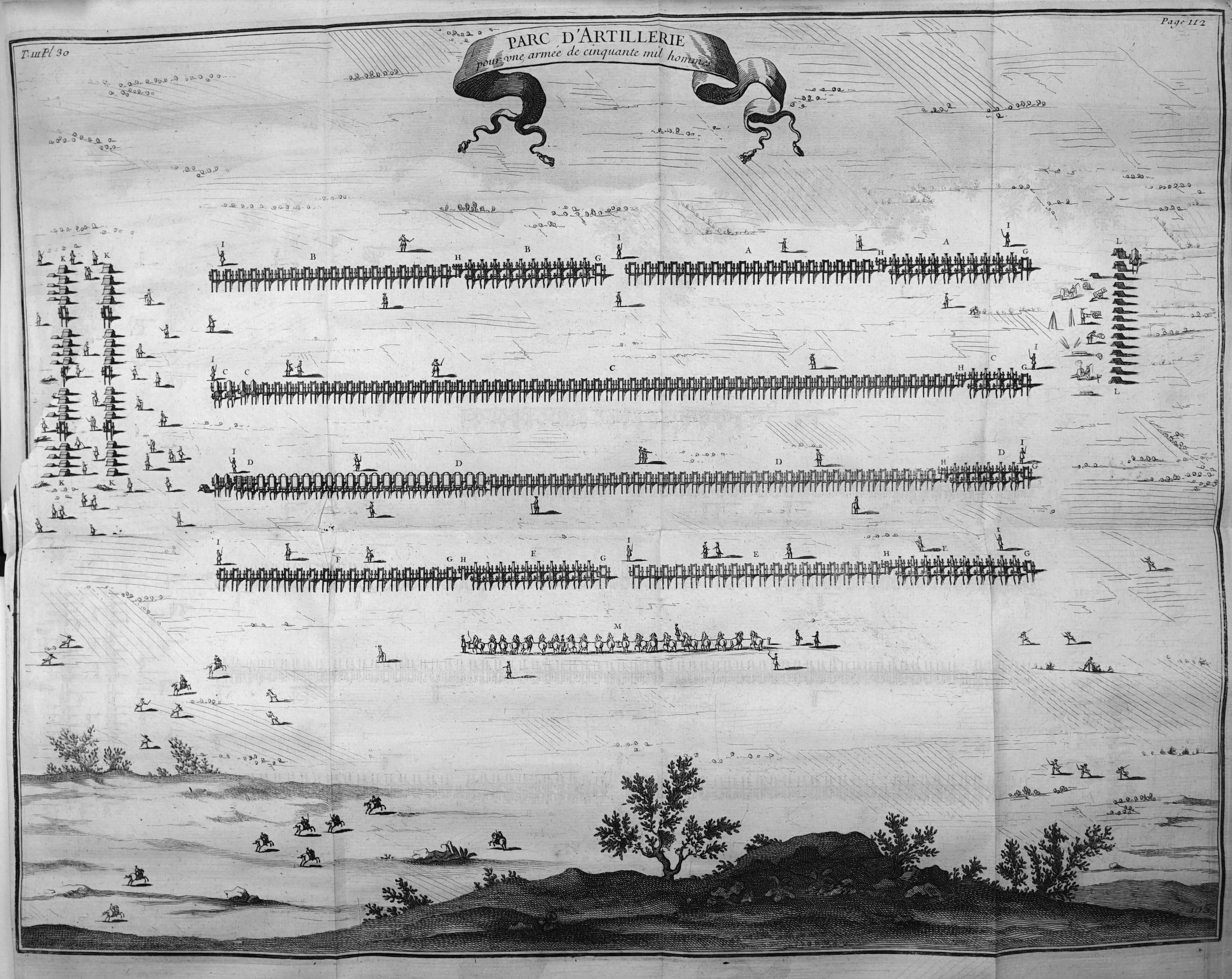 Mémoires d'artillerie, recueillis par M. Surirey de Saint Remy, tome III, exemplaire de la B.M. de Reims, troisième édition.